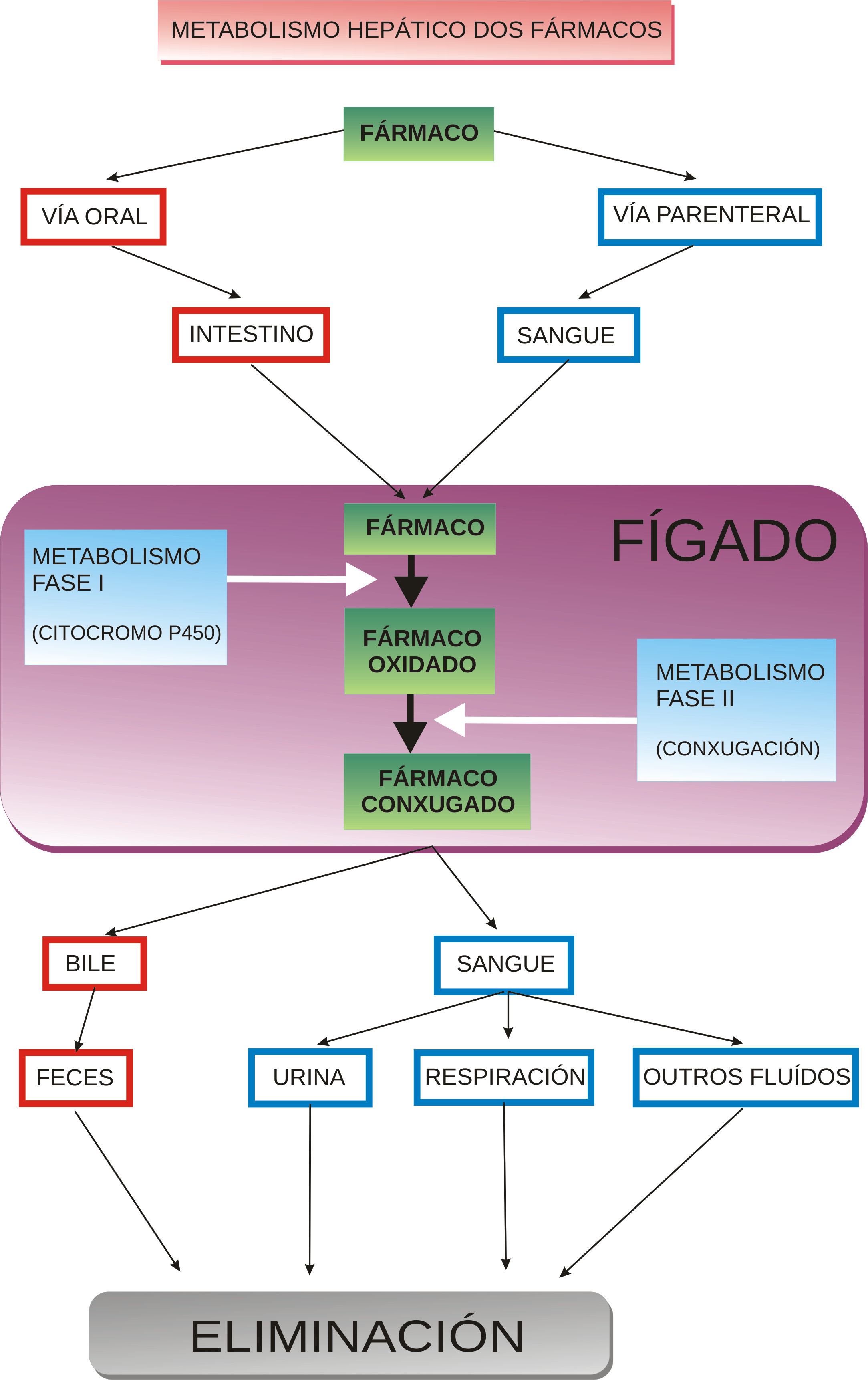 diagrama do metabolismo hepático e eliminación de fármacos